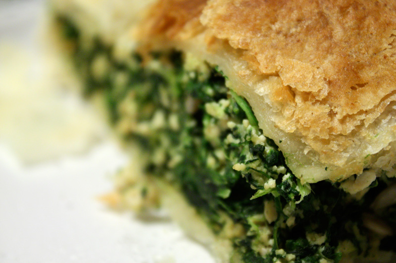 Vegan Spinach pie